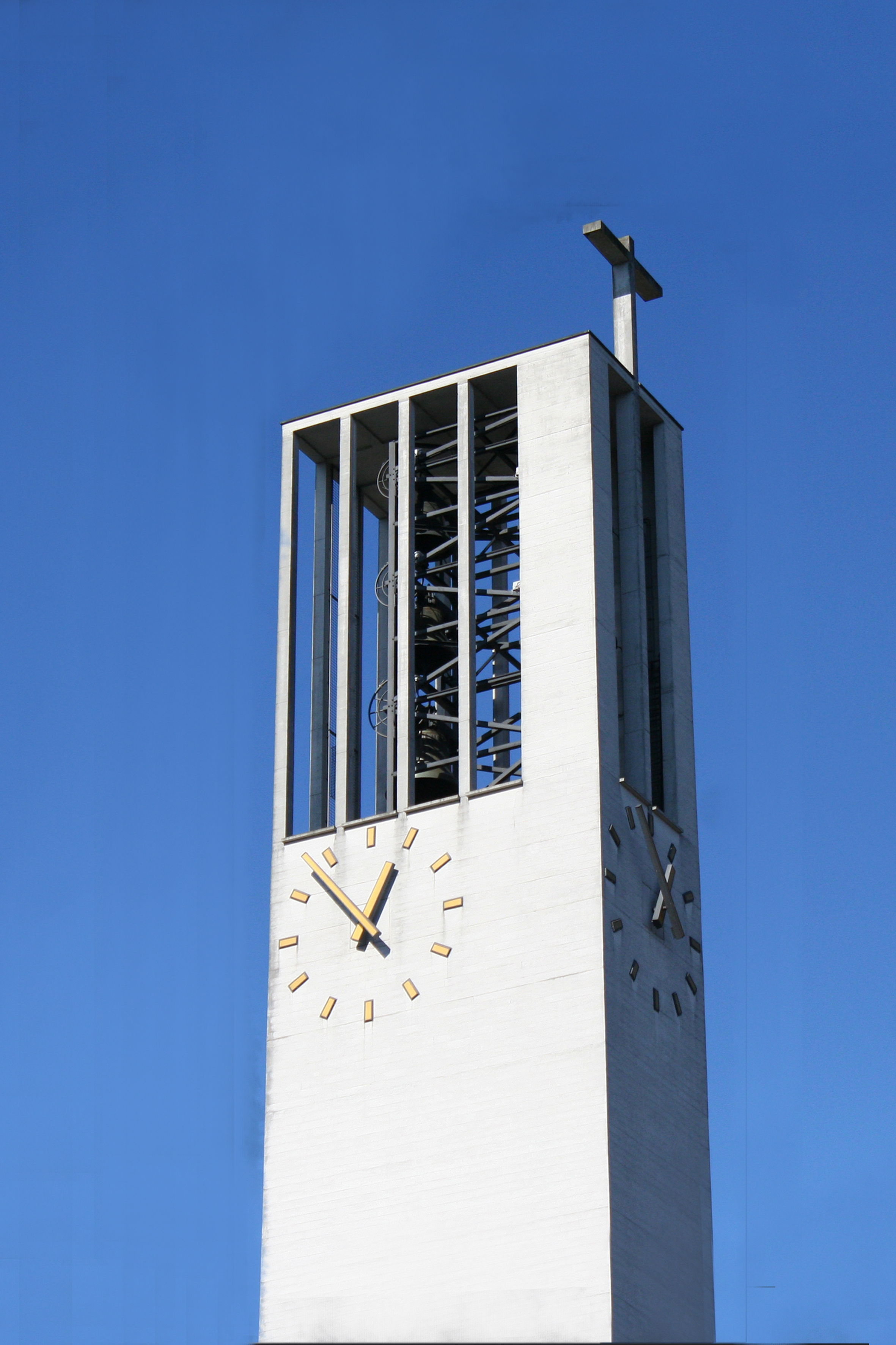 Römisch-katholische Pfarrkirche Sankt Karl Luzern